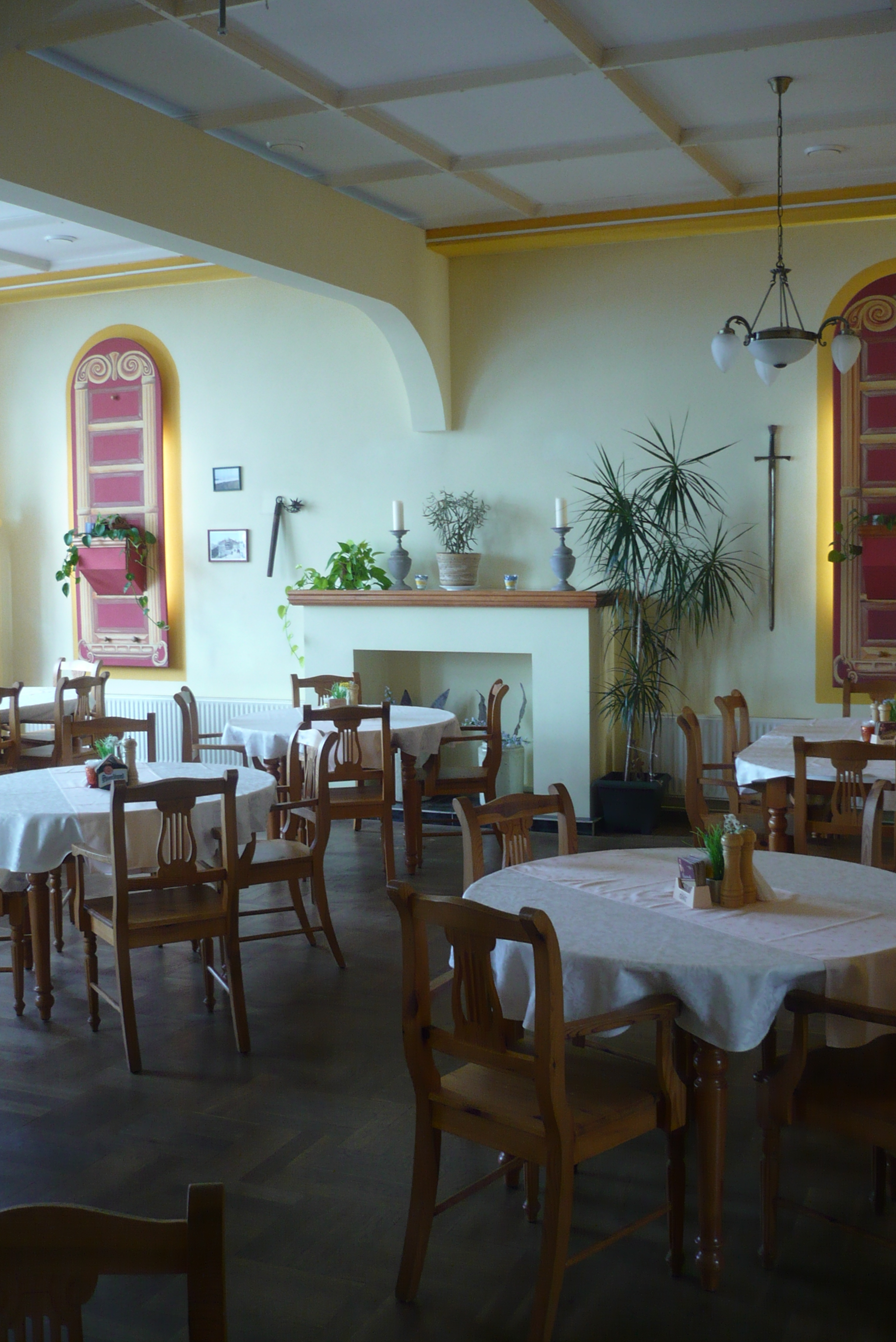 Janovicky. Zajazd Franza Birkego z 1916 r.